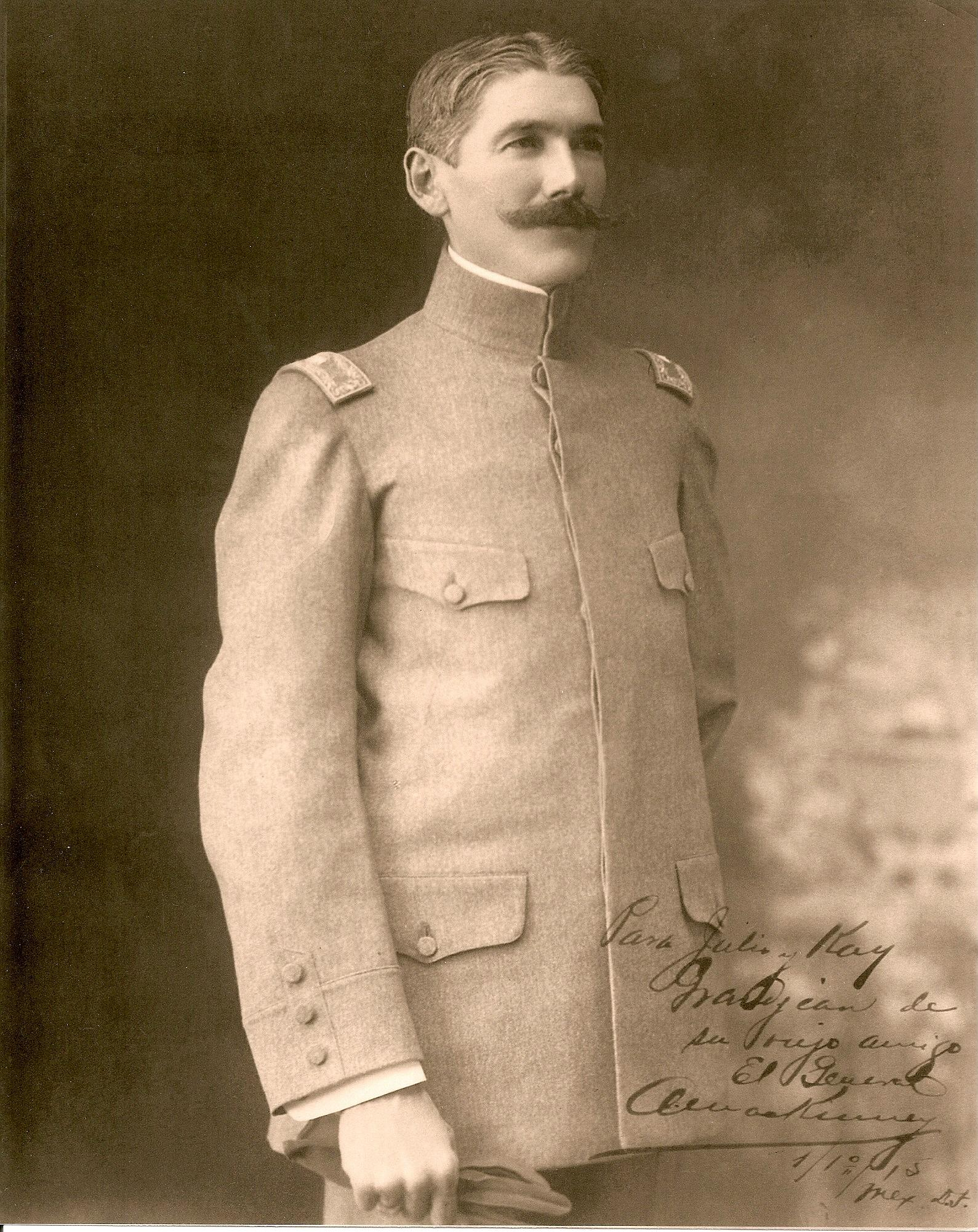 El general Alejandro MacKinney Huerta